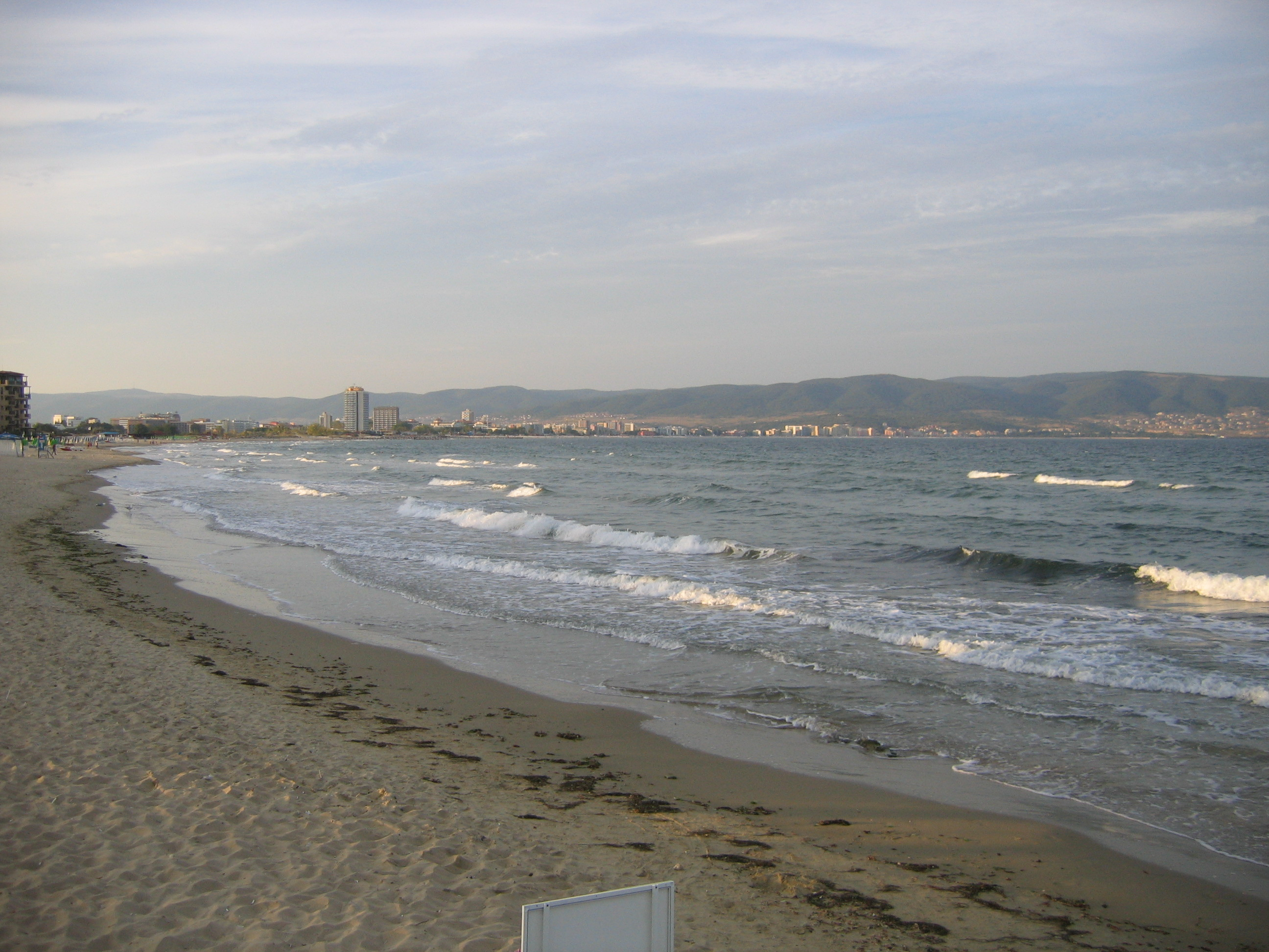 Солнечный берег, Солнечный берег, Несебр, Болгария